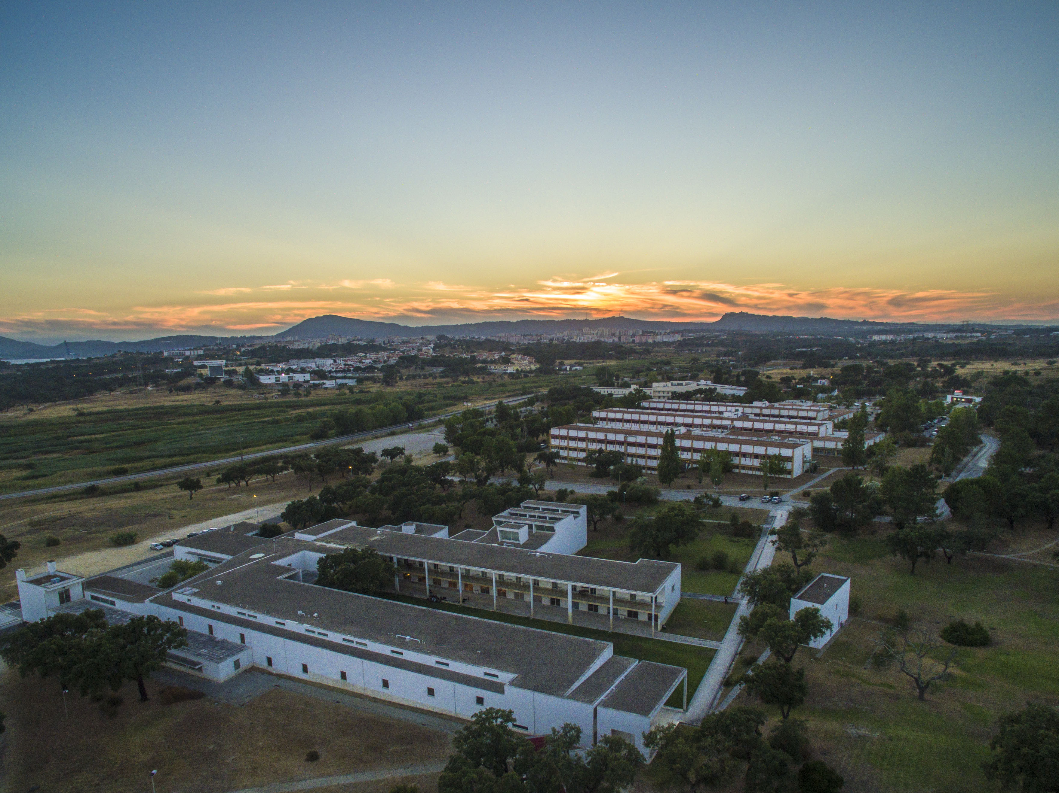 Vista aérea do campus do IPS em Setúbal